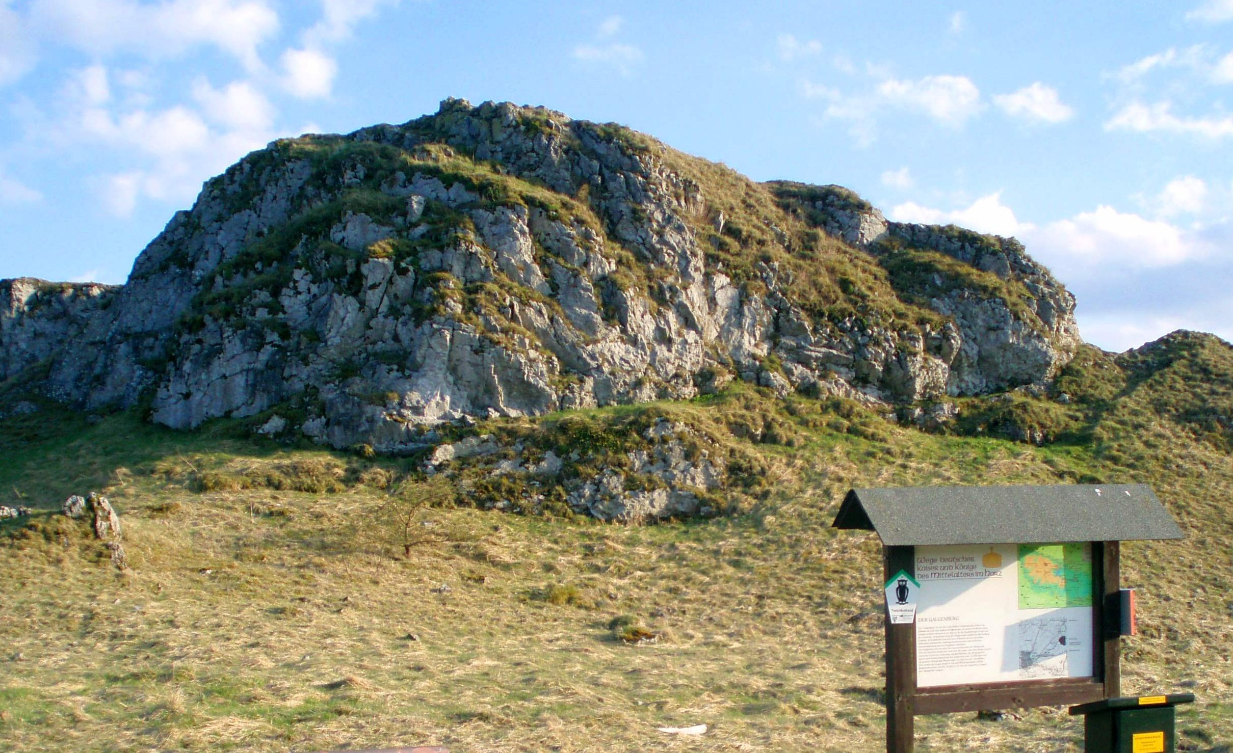 Galgenberg bei Elbingerode (Harz), Deutschland.